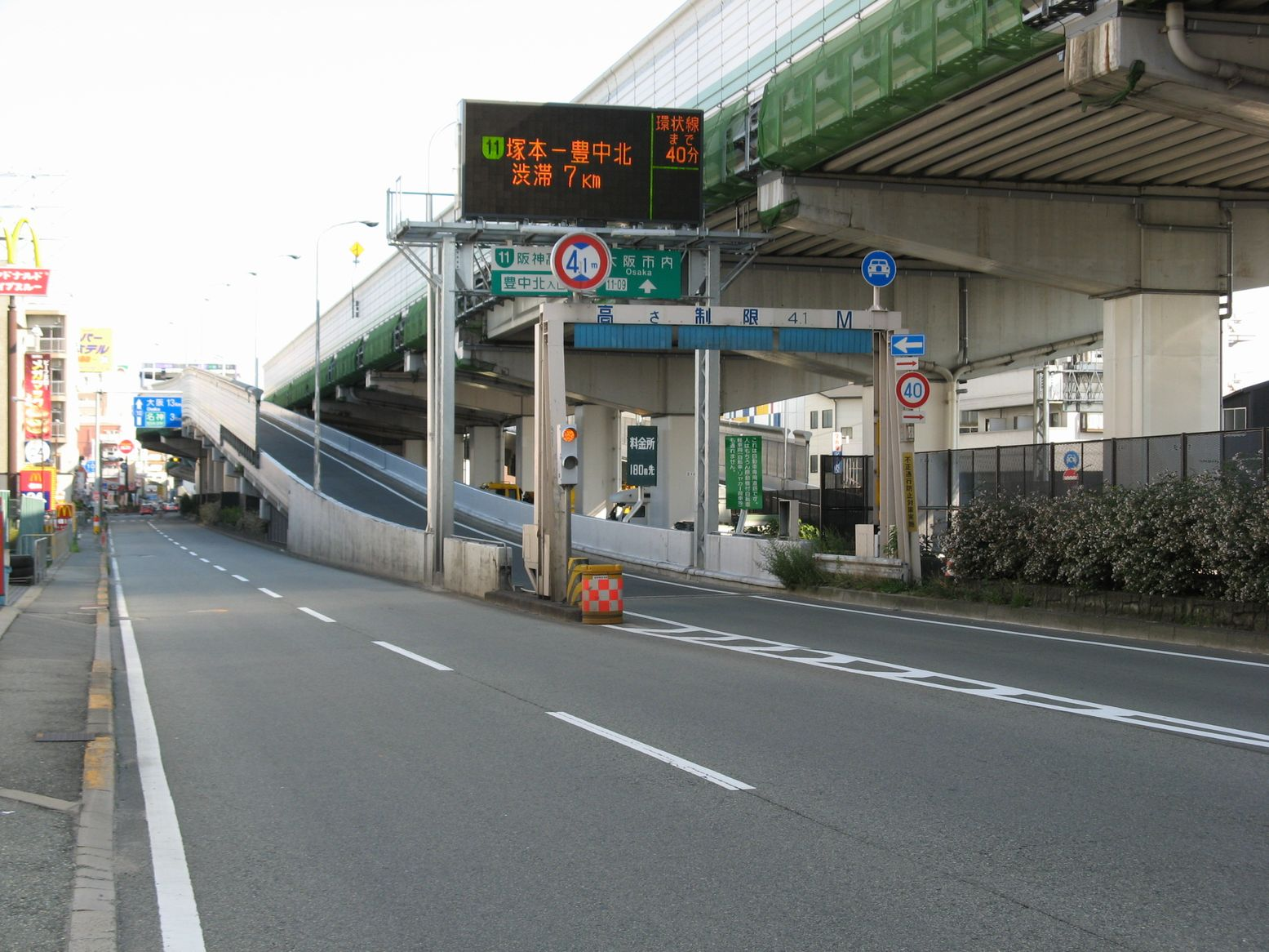 阪神高速豊中北出入口 南行入口